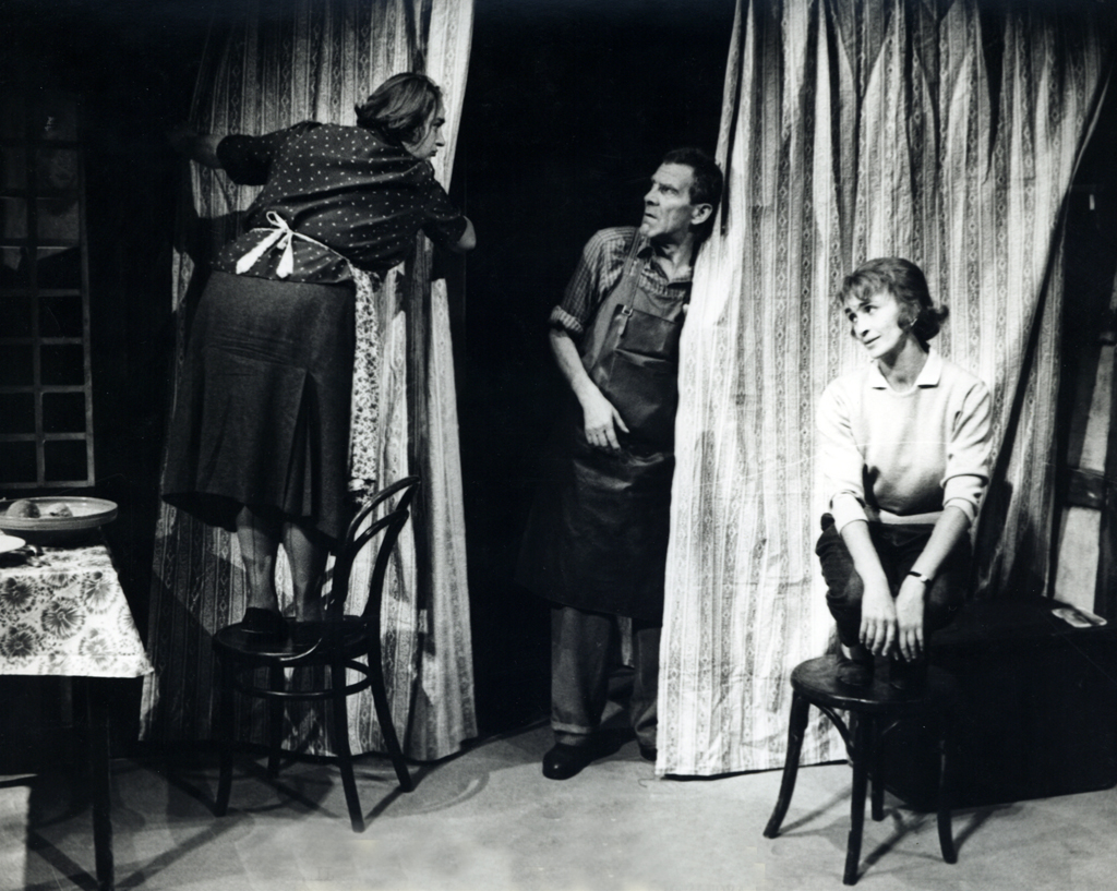 Arnold Wesker, Korenine, Drama SNG v Ljubljani. Na fotografiji: Mila Kačič (Mati Bryantova), Jože Zupan (Oče Bryant), Ivanka Mežan (Beatie Bryant).